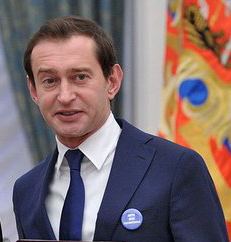 Москва, Кремль. «НАРОДНЫЙ АРТИСТ РОССИЙСКОЙ ФЕДЕРАЦИИ». ХАБЕНСКИЙ Константин Юрьевич – артист Московского Художественного академического театра имени А.П. Чехова.